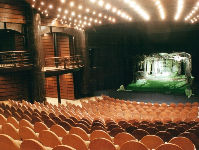 Hlediště a jeviště Činoherní scény Městského divadla Brno